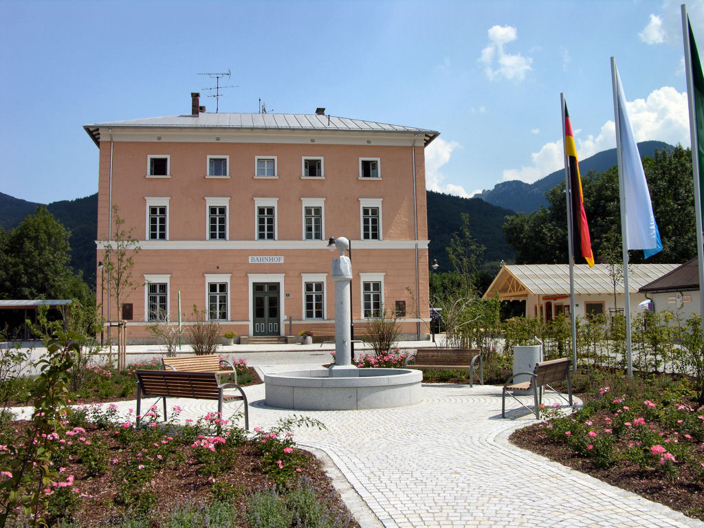 Bahnhof Aschau im Chiemgau (Deutschland, Bayern)